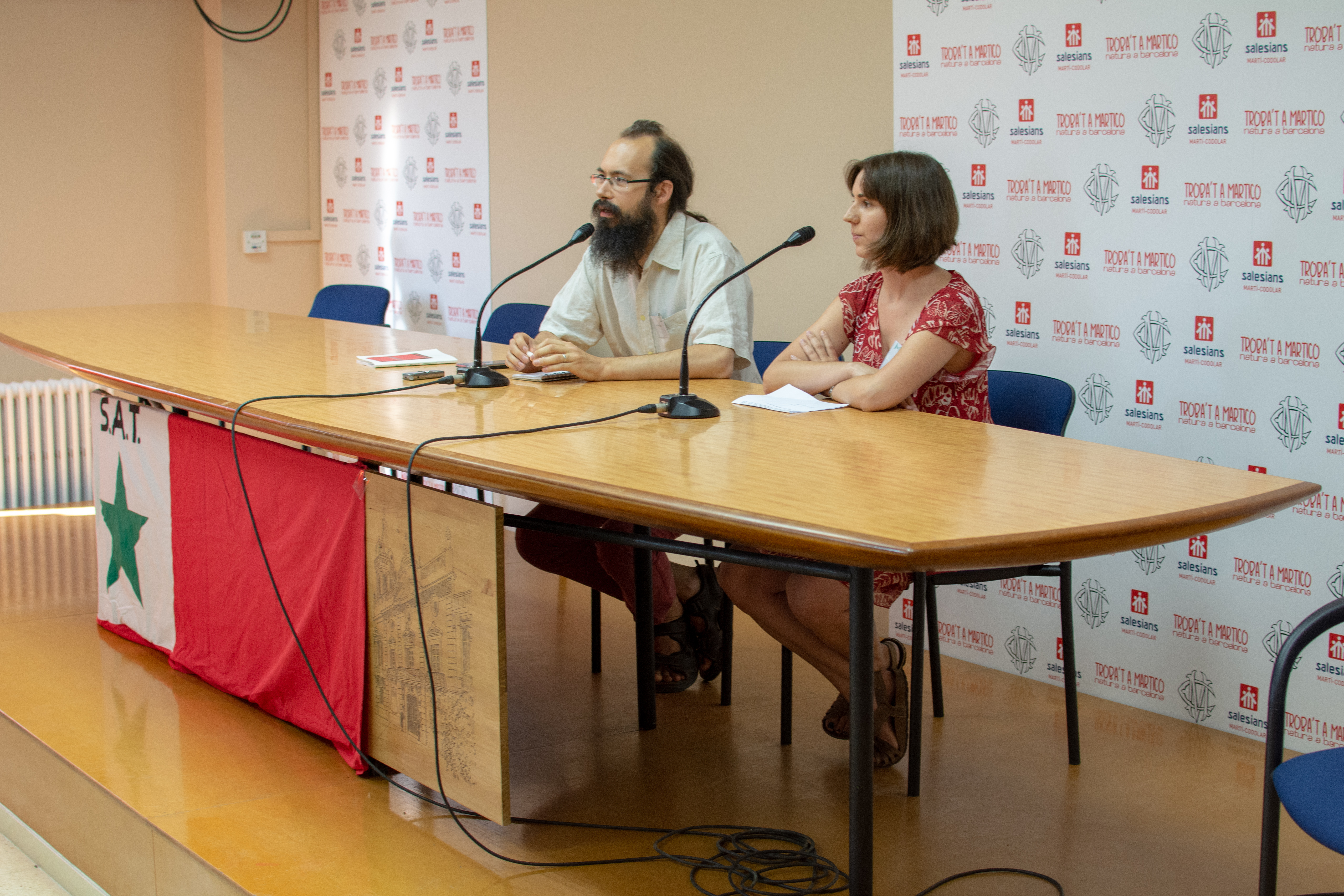 Malfermo de la SAT-Kongreso 2019